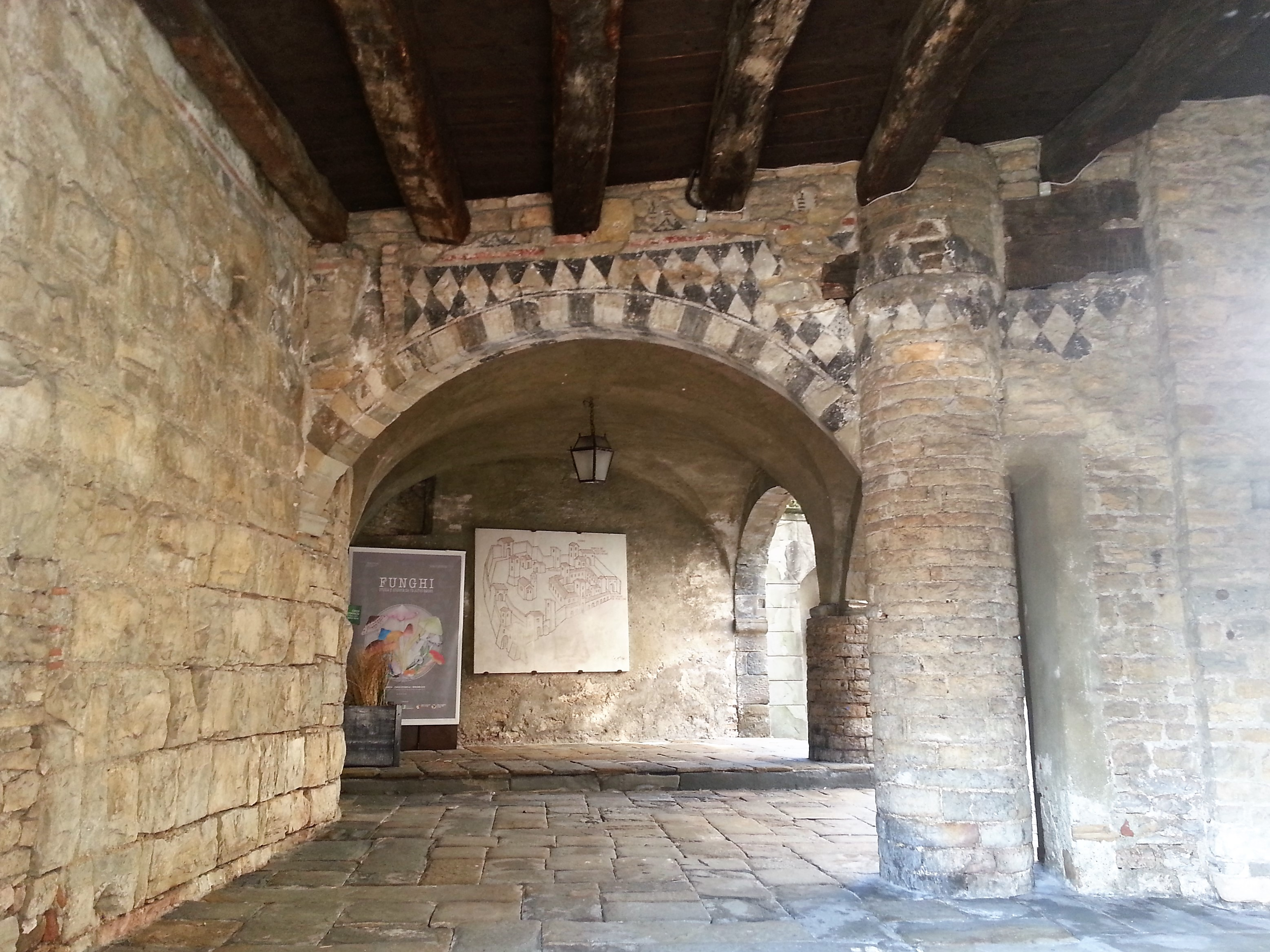 Cittadella viscontea Bergamo